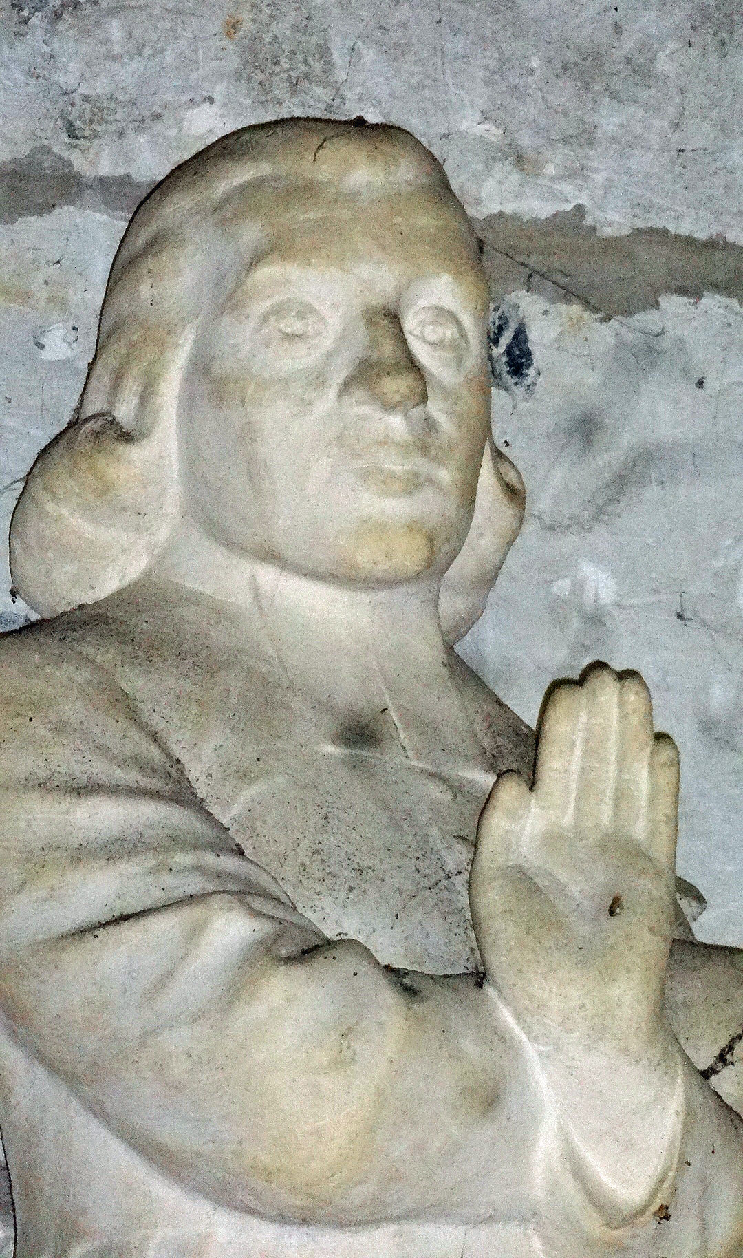 Statue de Thomas Jean Montsaint (1725-1792) dans l'église de Blangy-le-Château (Calvados).